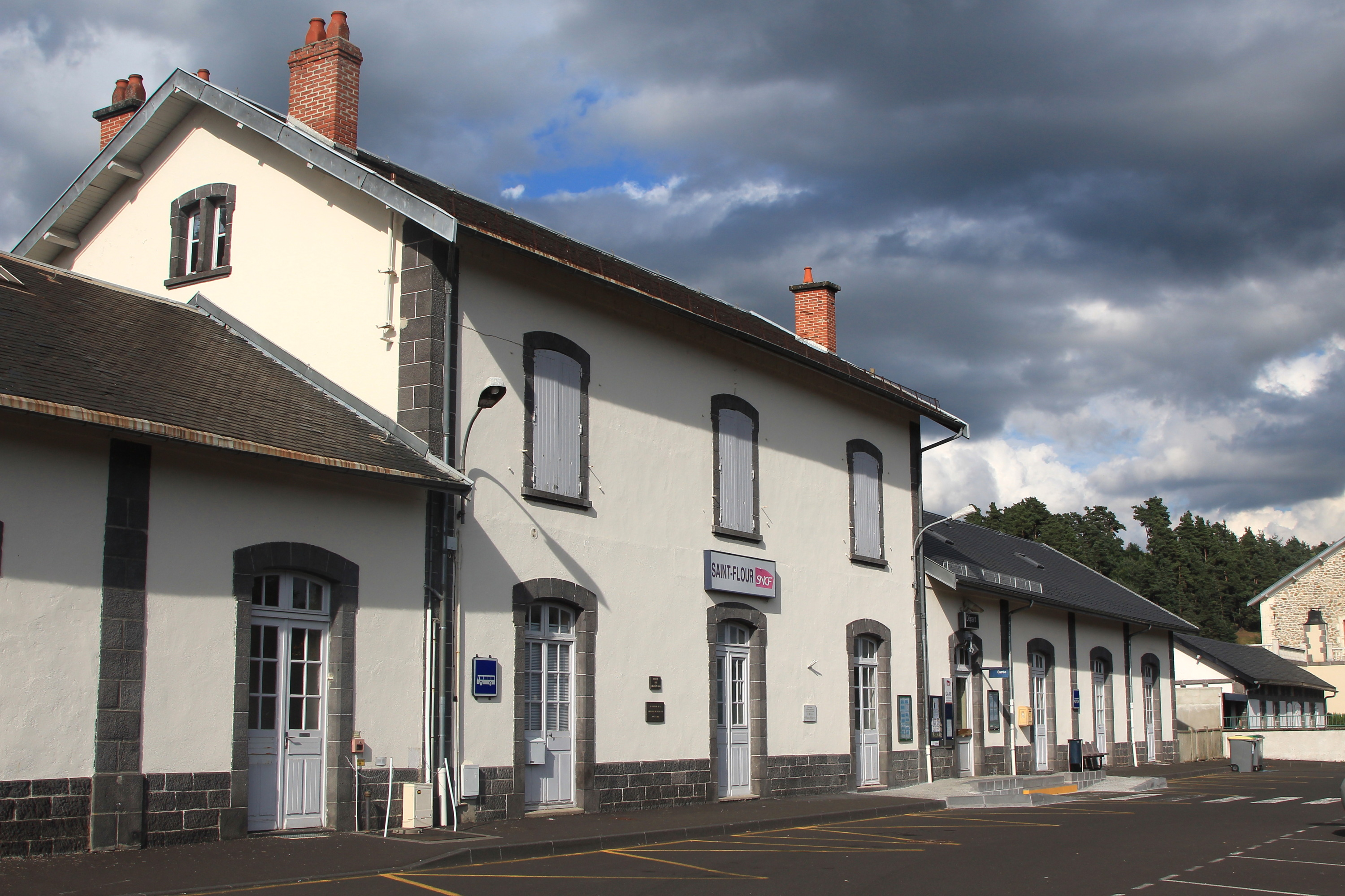 Le bâtiment voyageurs de la gare de Saint-Flour - Chaudes-Aigues vu côté cour.